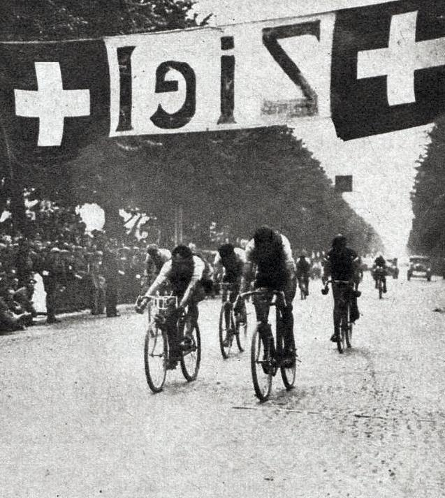 Pierino Bertolazzo (centre) champion du monde sur route amateurs, le 16 août 1929 à Zurich.